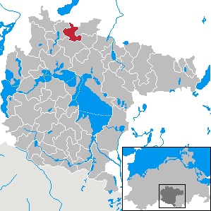 Moltzow im Landkreis Müritz, Mecklenburg-Vorpommern